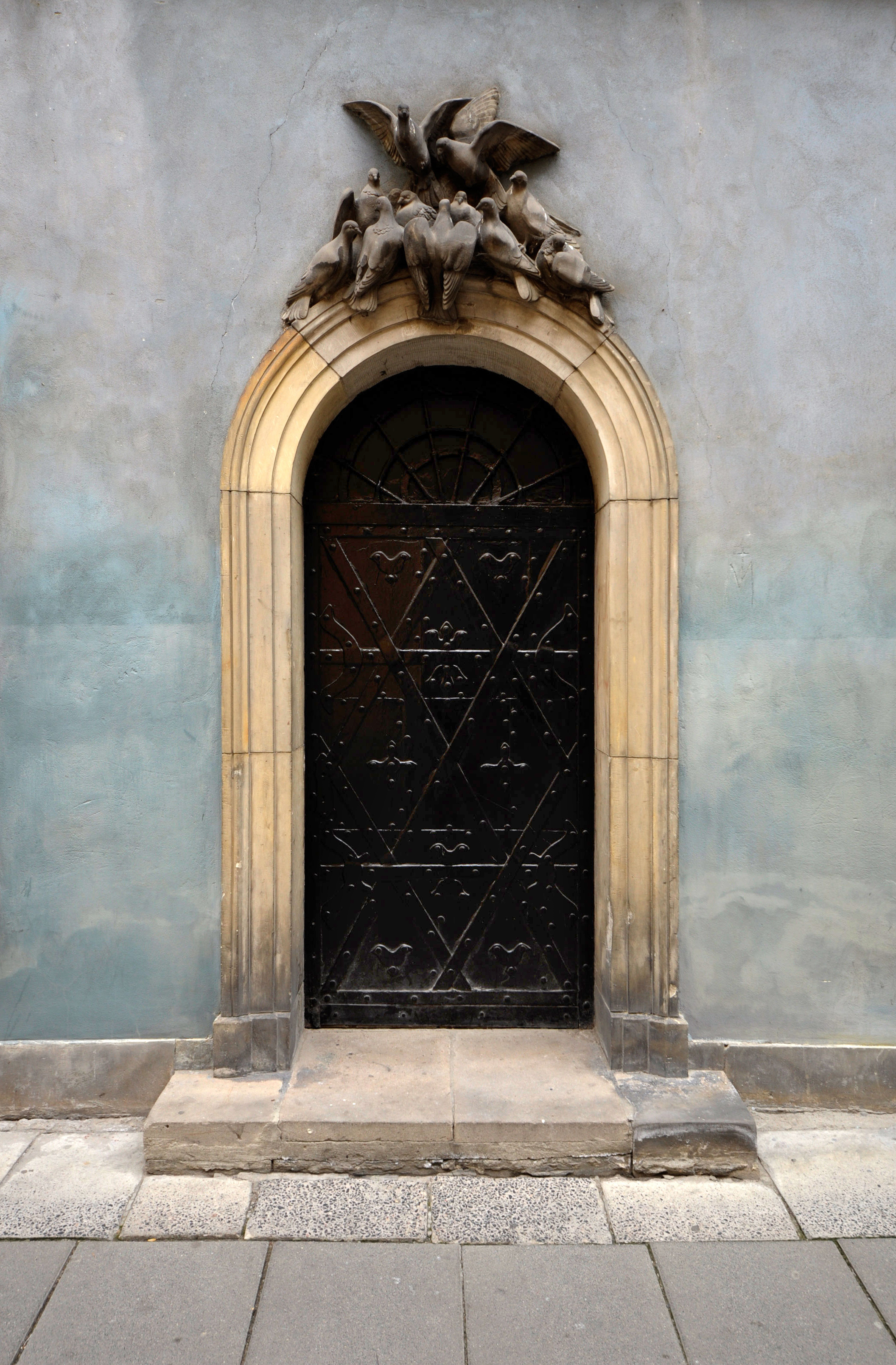 Kamienica Pod Gołębiami w Warszawie